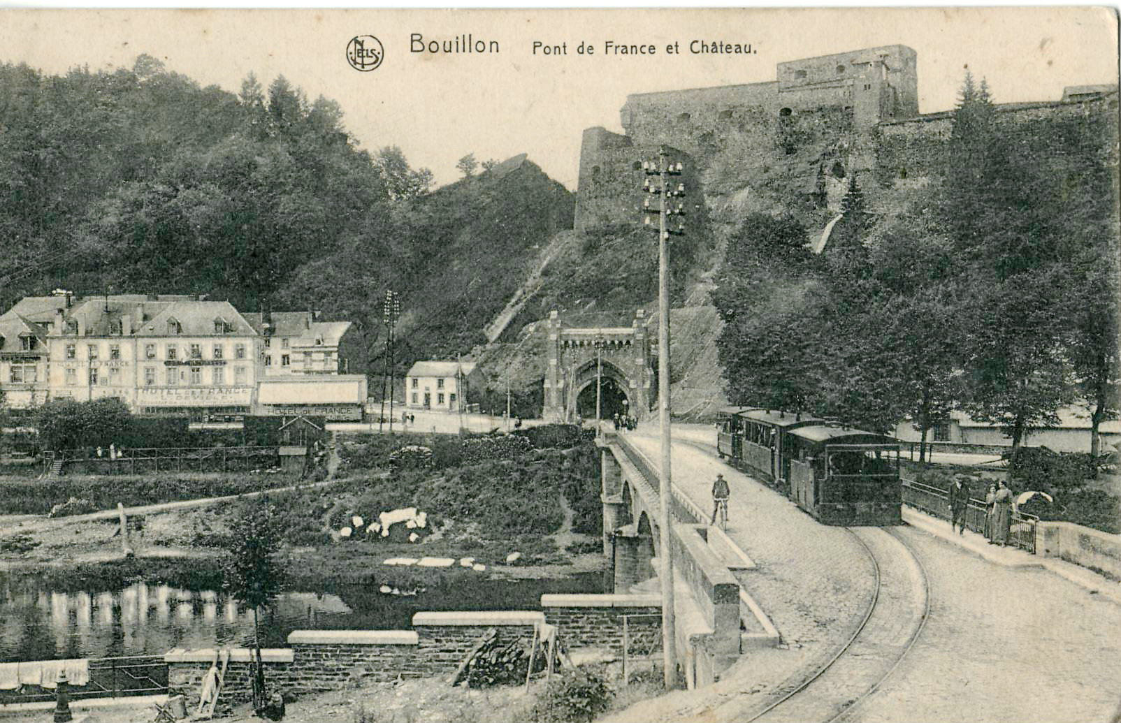 Carte postale ancienne éditée par Nels :BOUILLON - Pont de France et Château